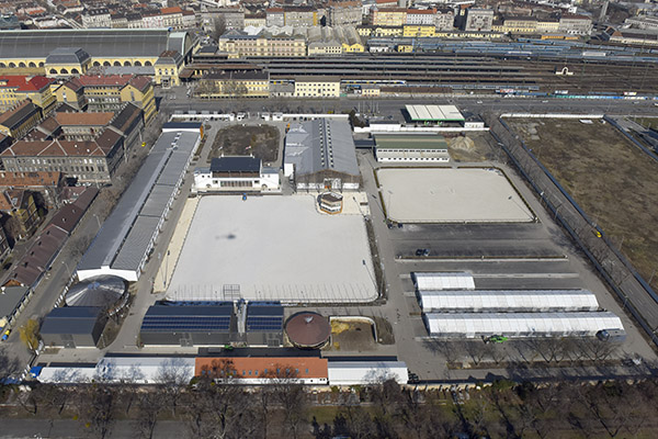 A Nemzeti lovarda (Cím: Budapest, Kerepesi út 7, 1087) a levegőből